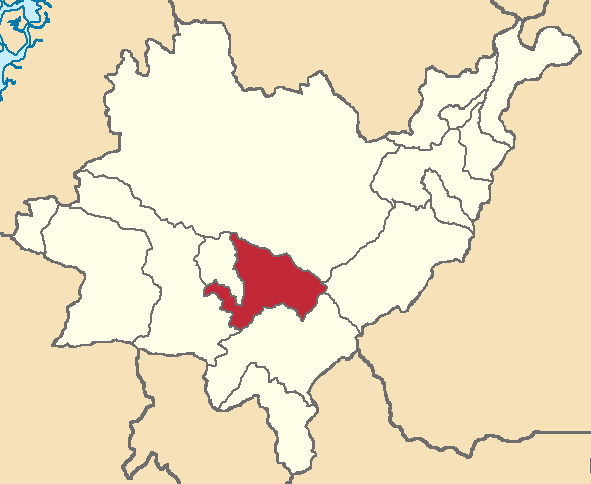 Mapa localizacor del cantón en Azuay, Ecuador